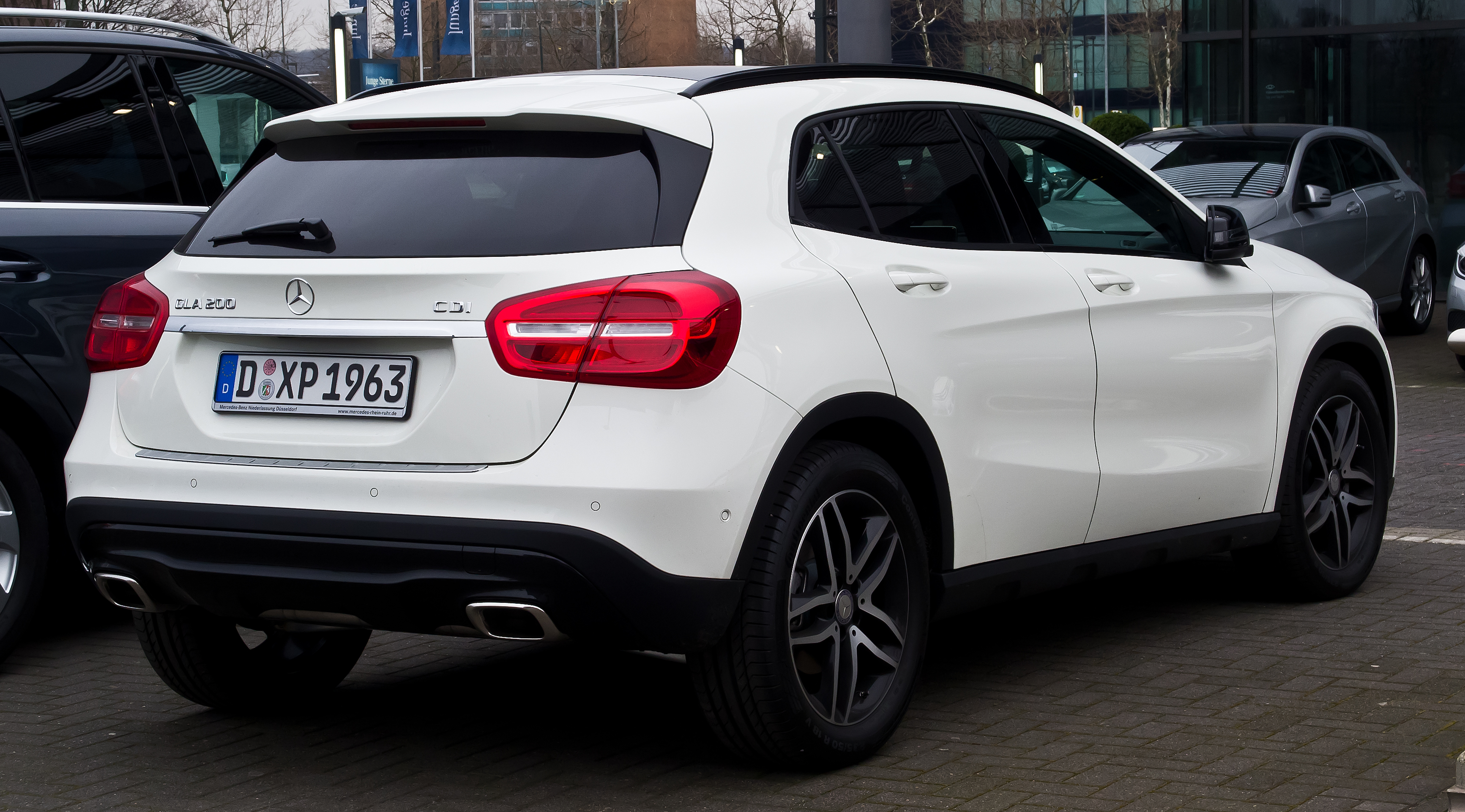 Mercedes-Benz GLA 200 CDI Urban (X 156)